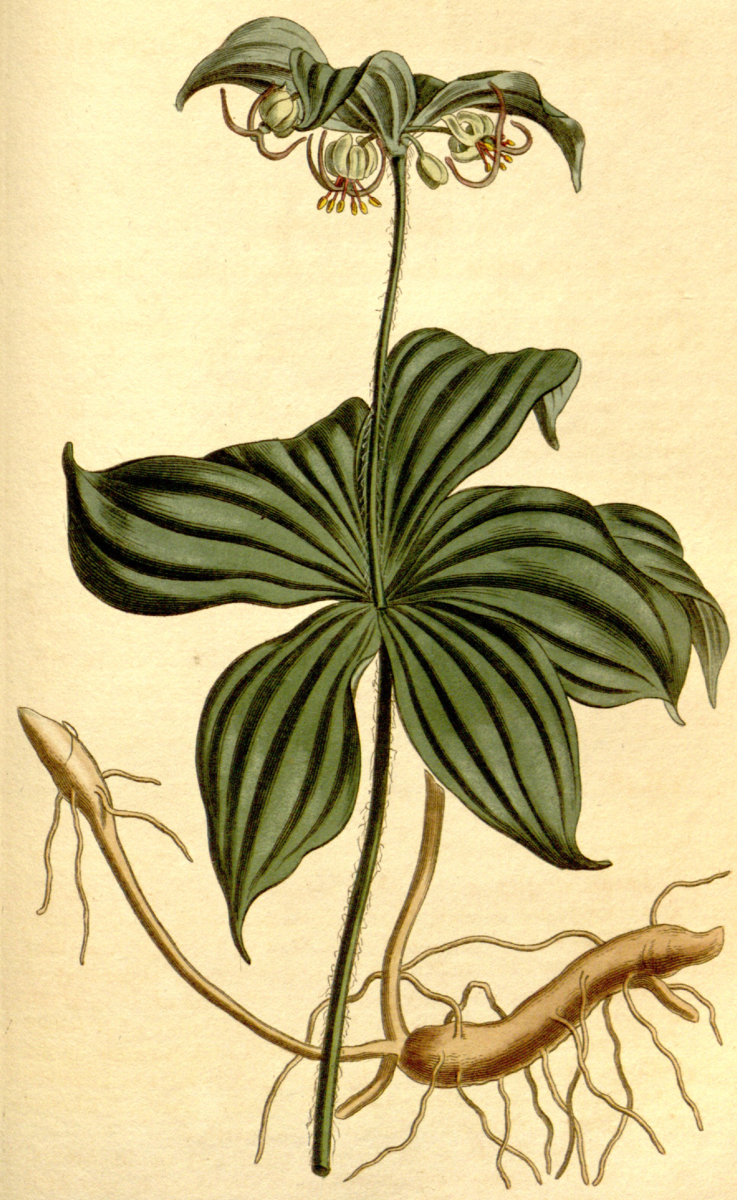 medeola wirgińska